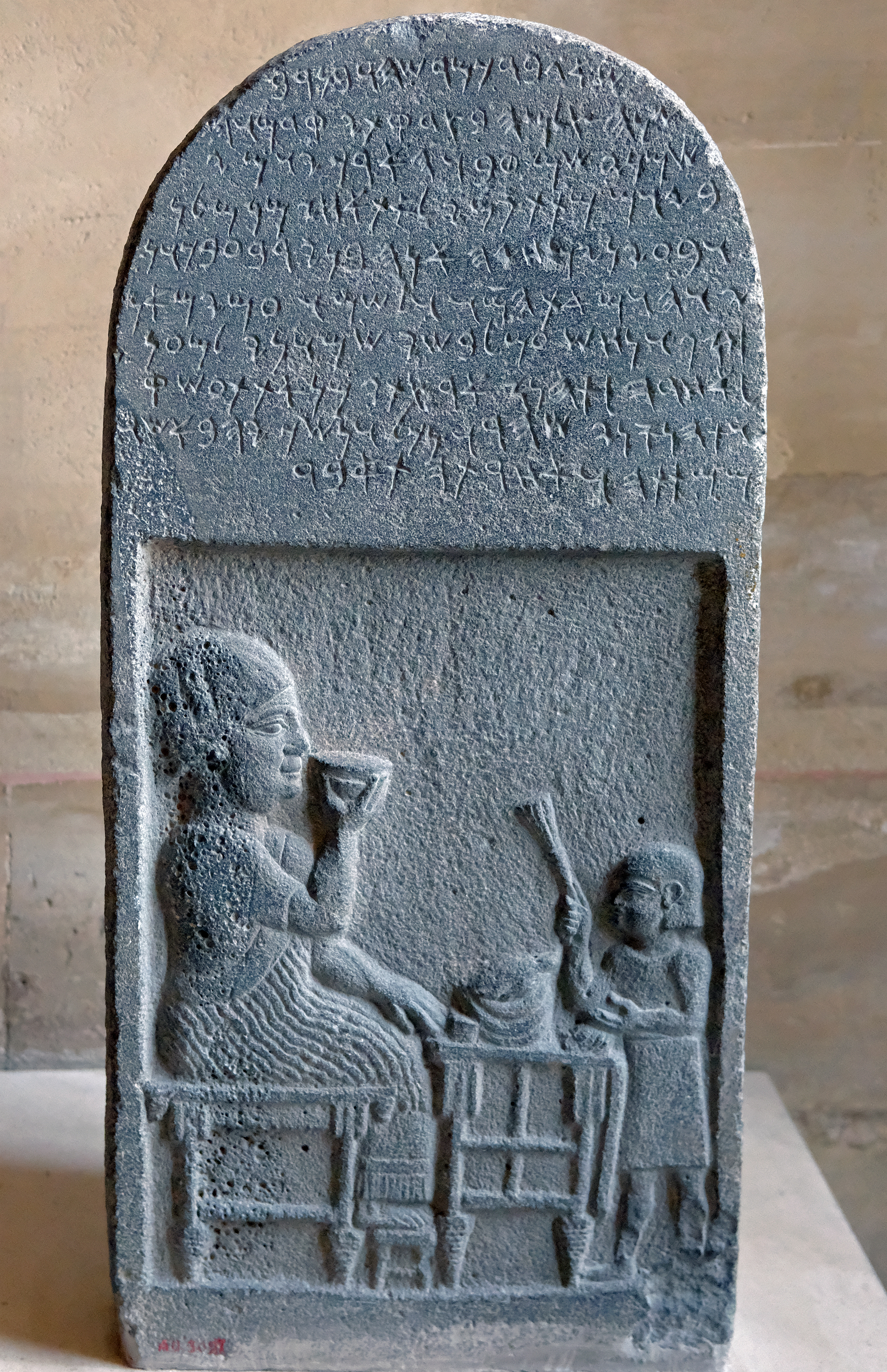 Cette stèle funéraire présente un décor sculpté et une inscription en araméen. Le décor montre le prêtre Si`gabbor banquetant devant une table d'offrande. KAI 226